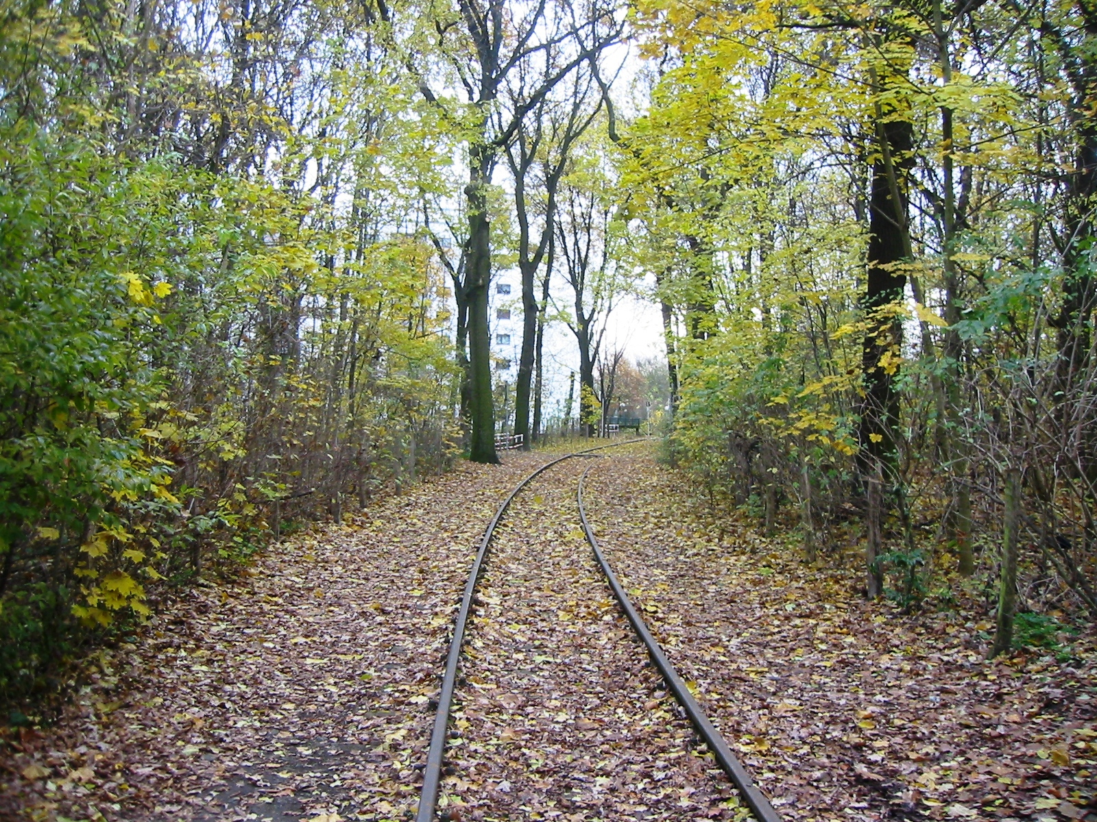 Ehemalige Bahnstrecke im LSG „Vogelschutzgebiet am Wildmeisterdamm in Rudow“